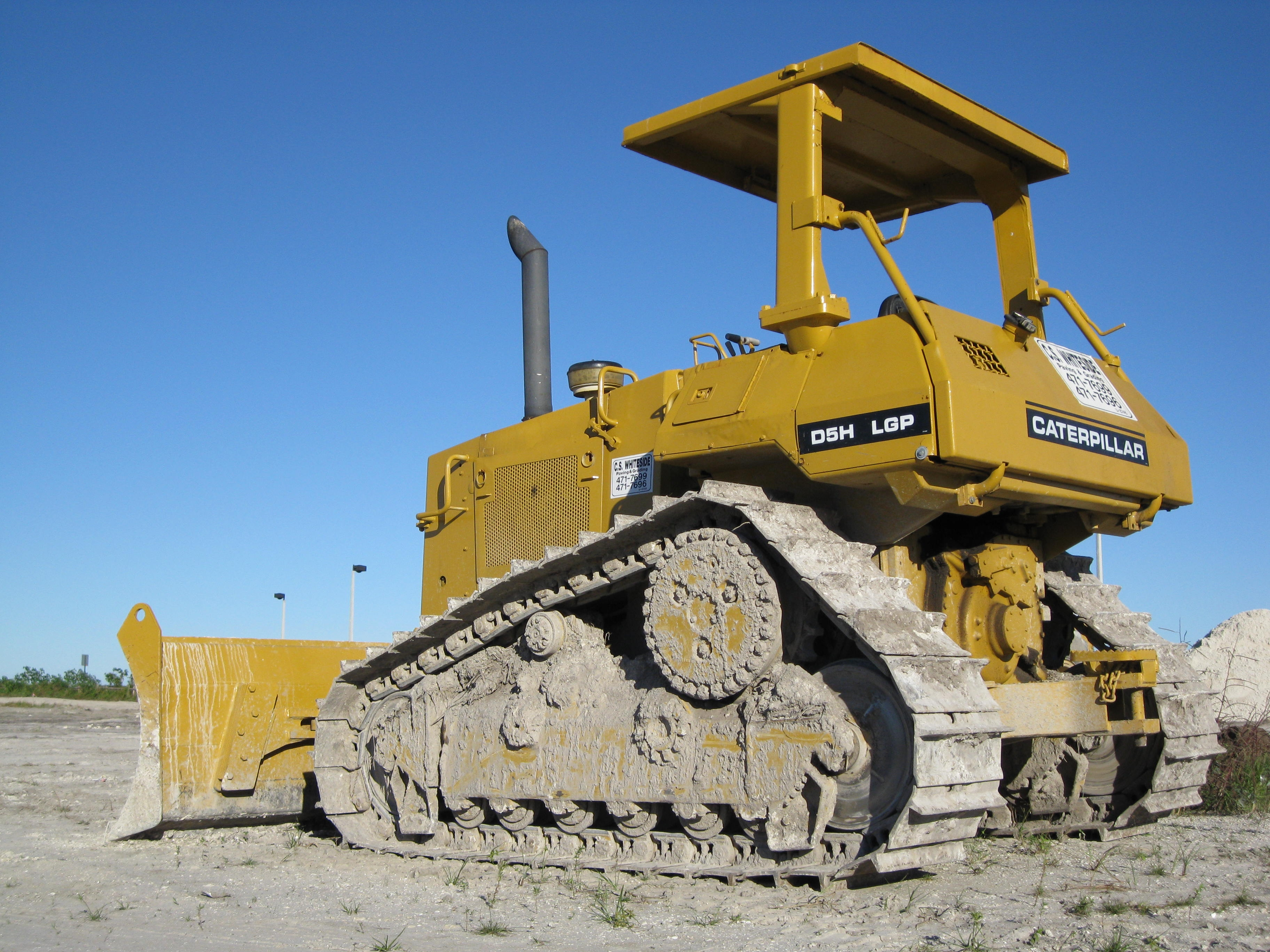 Caterpillar D5. Boca Raton, Fl.